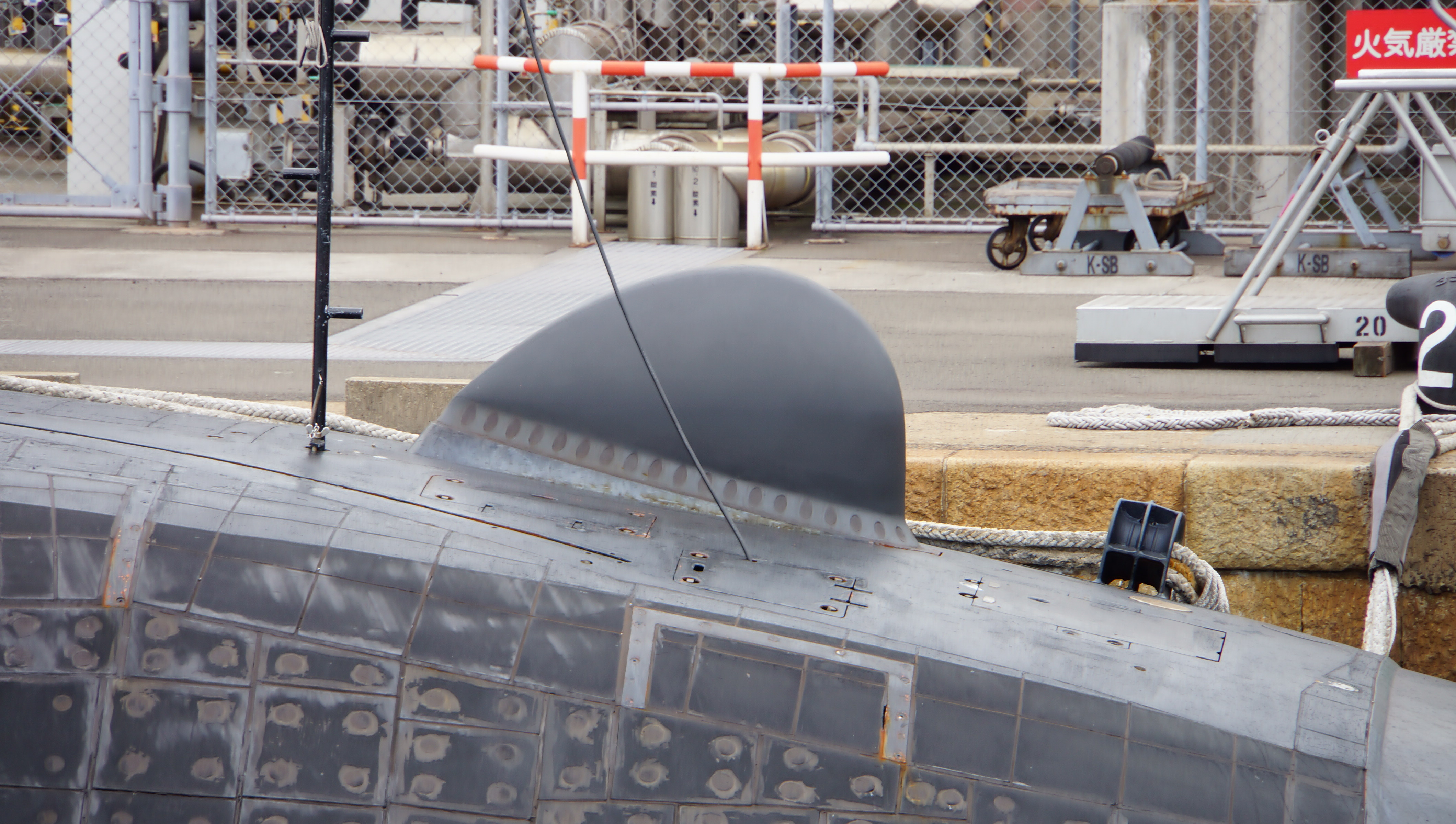 海上自衛隊 潜水艦うんりゅう（SS-502） 艦首逆探知用ソナー・ドーム。 14年9月15日 呉基地にて。